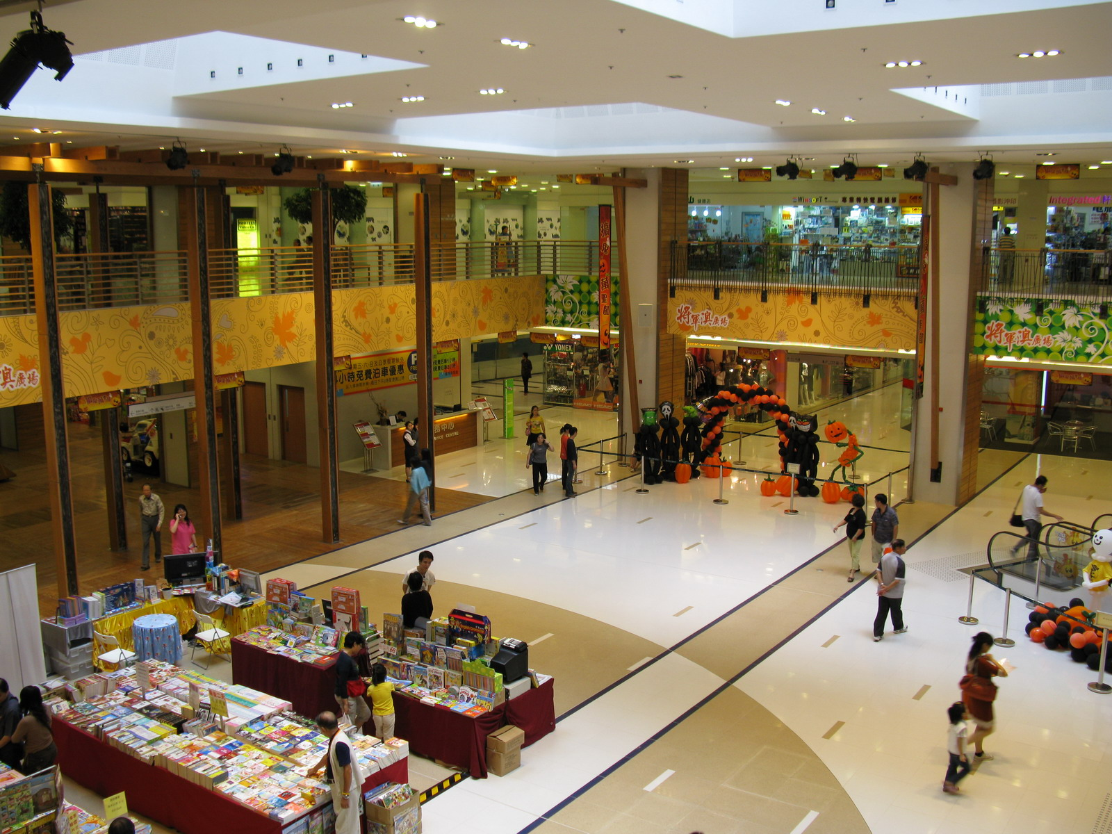 將軍澳廣場商場部分 Tseung Kwan O Plaza